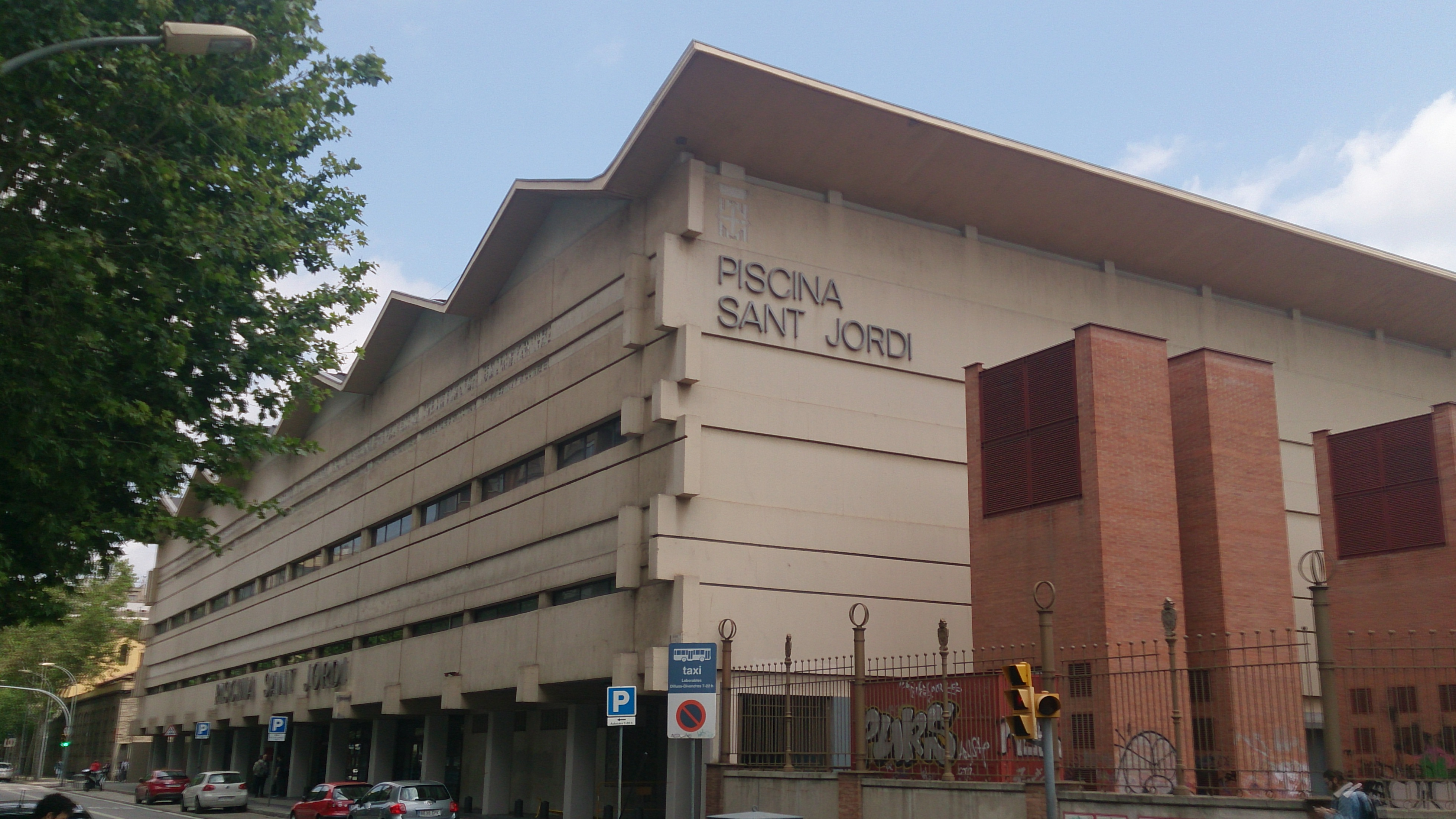 Fachada de la Piscina Sant Jordi, vista desde calle París.